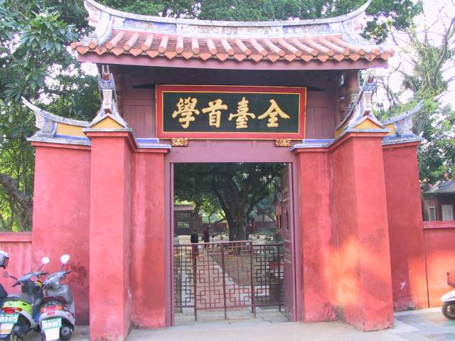 臺南孔廟大門, 個人所拍攝, 無著作權之疑慮Bân-lâm-gú: Tâi-lâm Khóng-tsú-biō tuā-mn̂g. 臺南孔子廟大門 Category:台南市